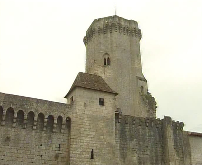 Focus sur le donjon du Château de Bourdeilles